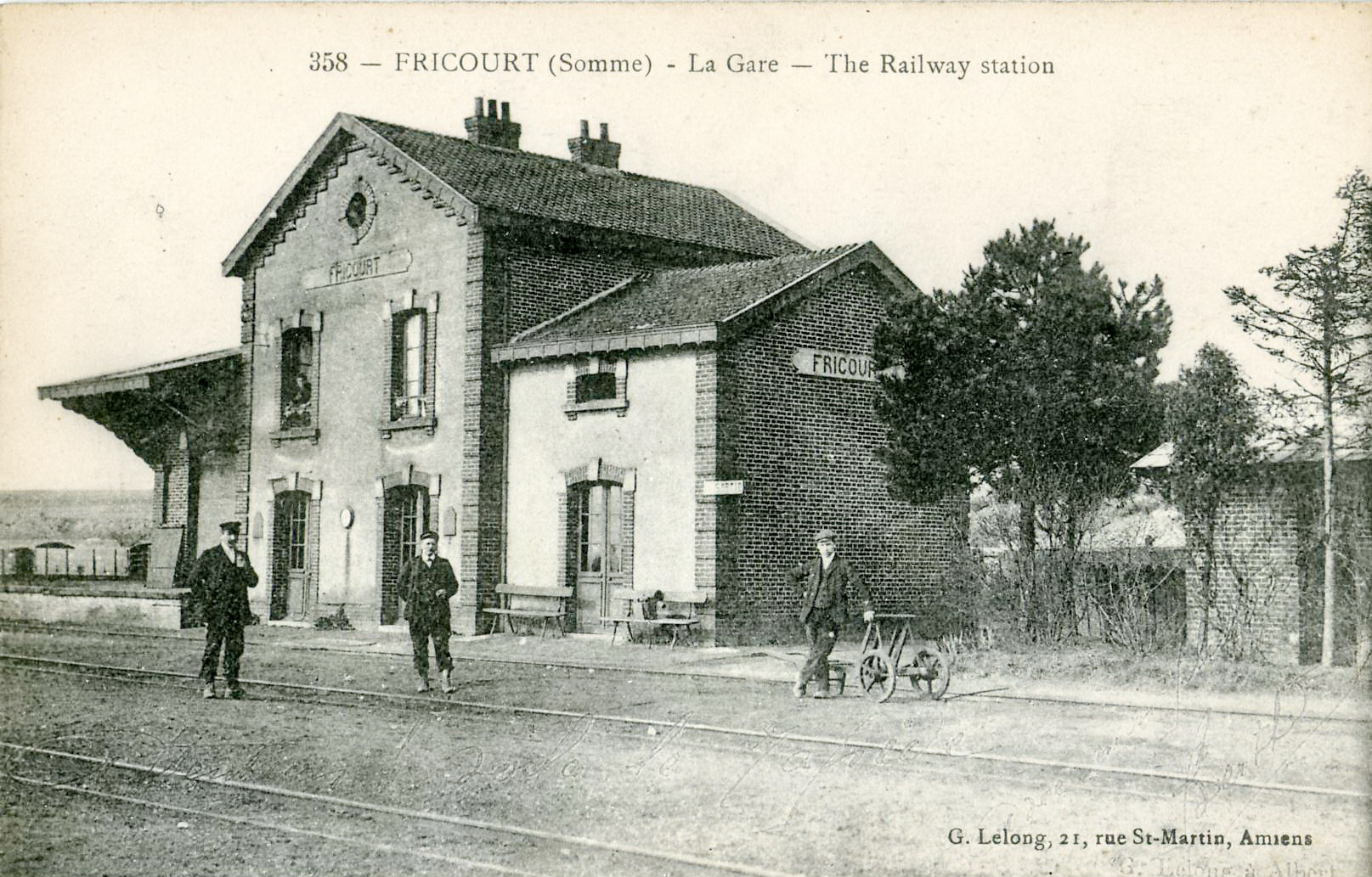 Carte postale ancienne éditée par Lelong à Amiens N°358w:fr:Fricourt:Fricourt (Somme - Picardie - France) : La GareIl s'agit de la gare des Chemins de fer départementaux de la Somme